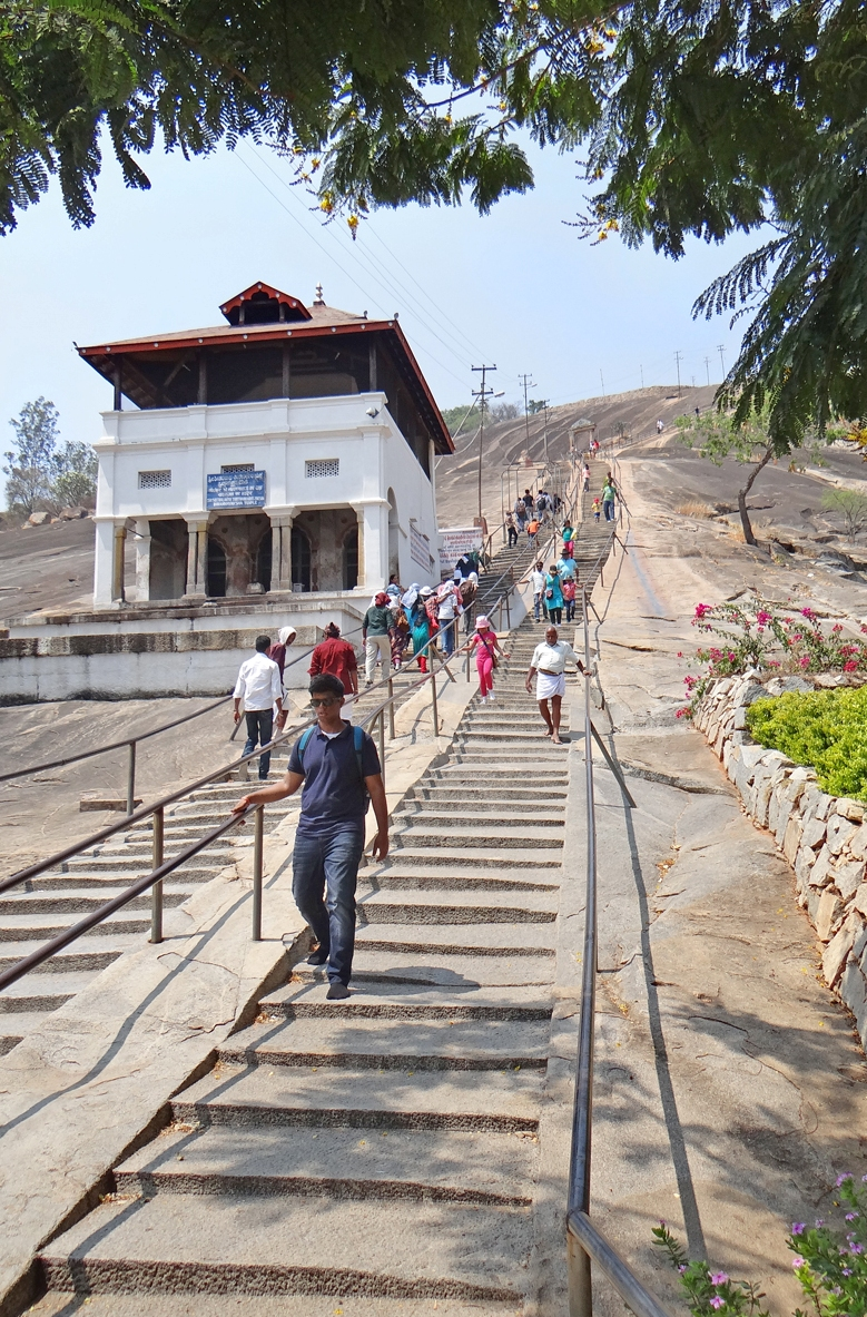 L'escalier pour monter au sanctuaire jaïn de Gomateshwara (Bahubali) Ce sanctuaire est au sommet de la colline Vindhyagiri ou Indragiri, un des lieux sacrés de la religion jaïne, construit au XIIème siècle mais ce lieu de culte remonte à l'antiquité. Shravanabelagola ou Sravanabelgola est une ville de l'État du Karnataka en Inde, dans le district d'Hassan. C'est le plus important centre religieux du Jaïnisme, surtout connu pour la colossale statue de Gomateshvara. Extrait de Wikipedia